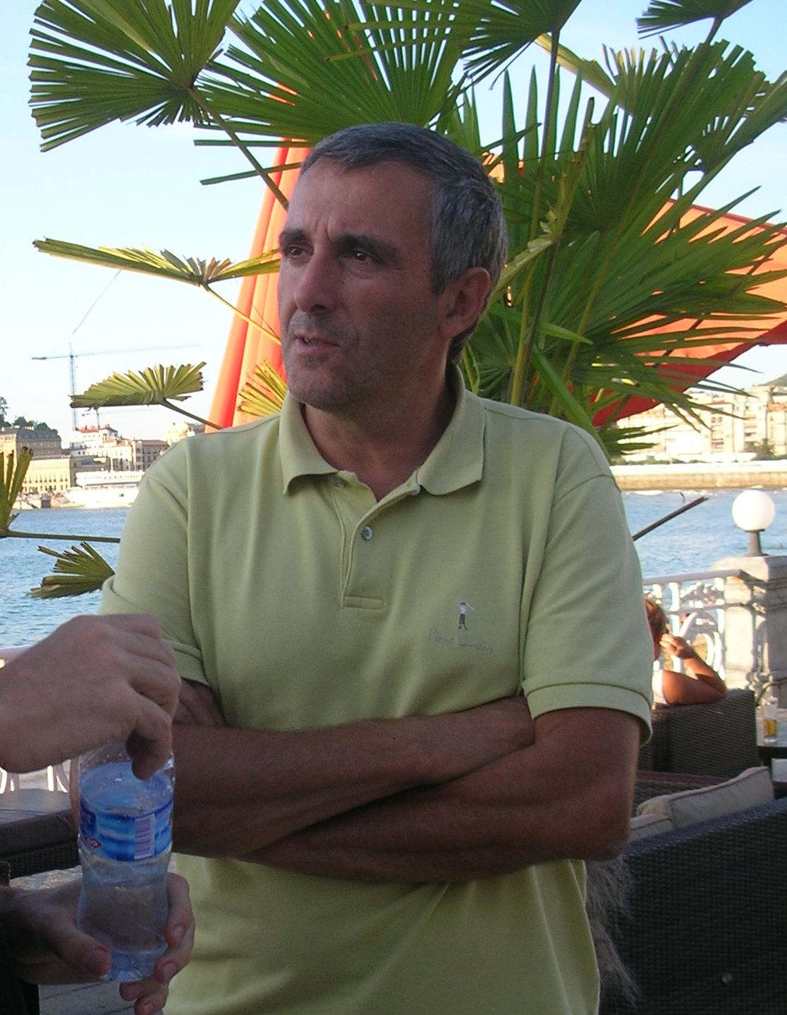 Iñaki Irazabalbeitia donostiarra 2009an.